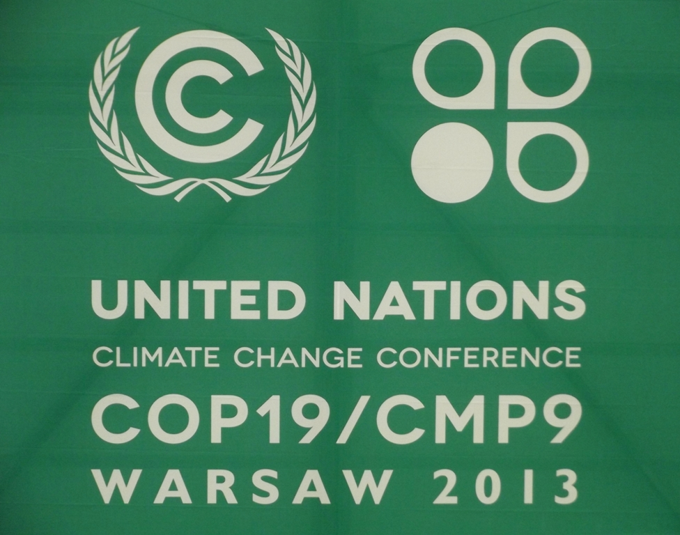 Zdjęcie zrobione podczas 19. Ramowej Konwencji Narodów Zjednoczonych ds. Zmian Klimatu (COP19) w Warszawie.